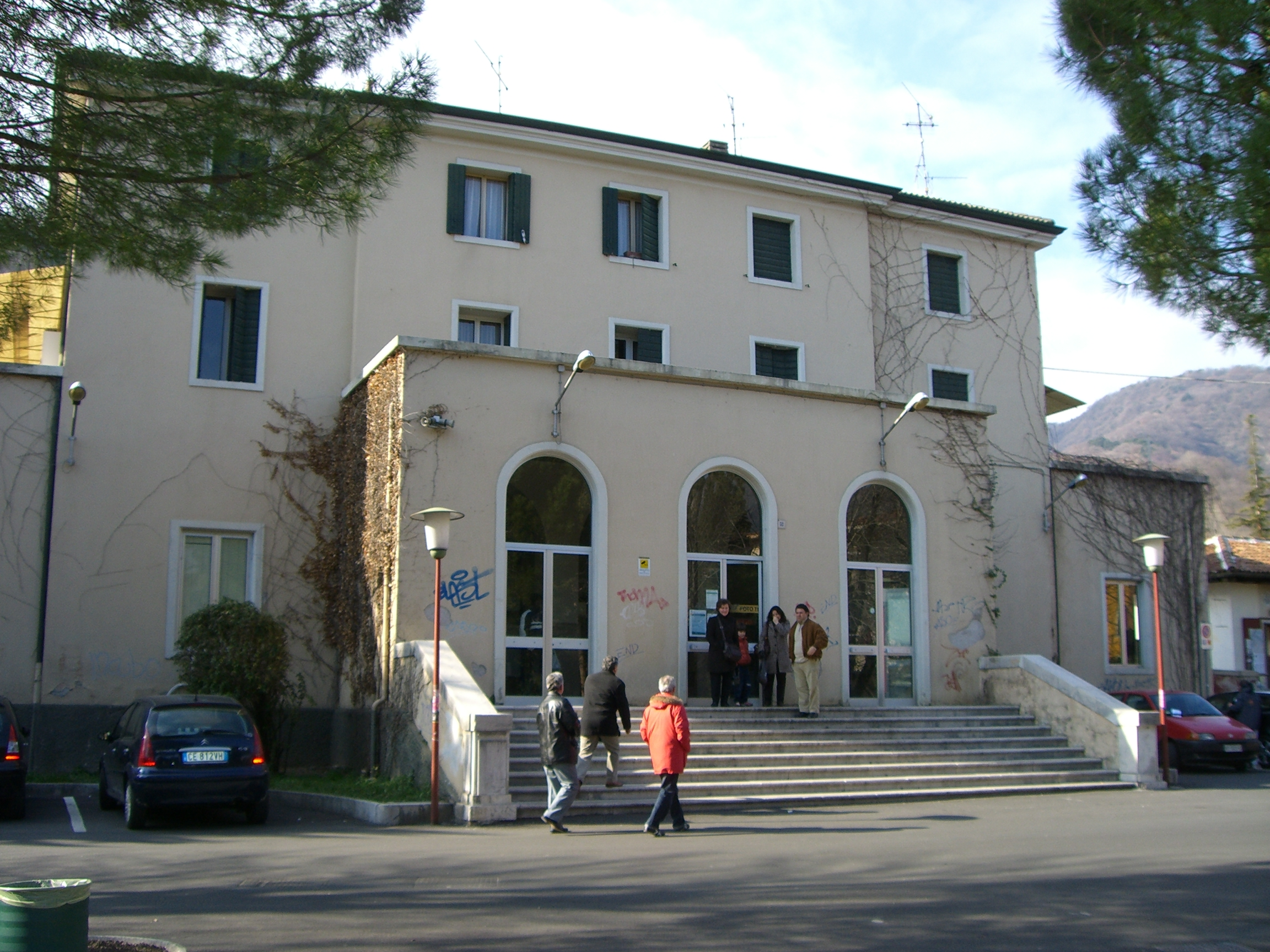 Facciata esterna della stazione di Vittorio Veneto